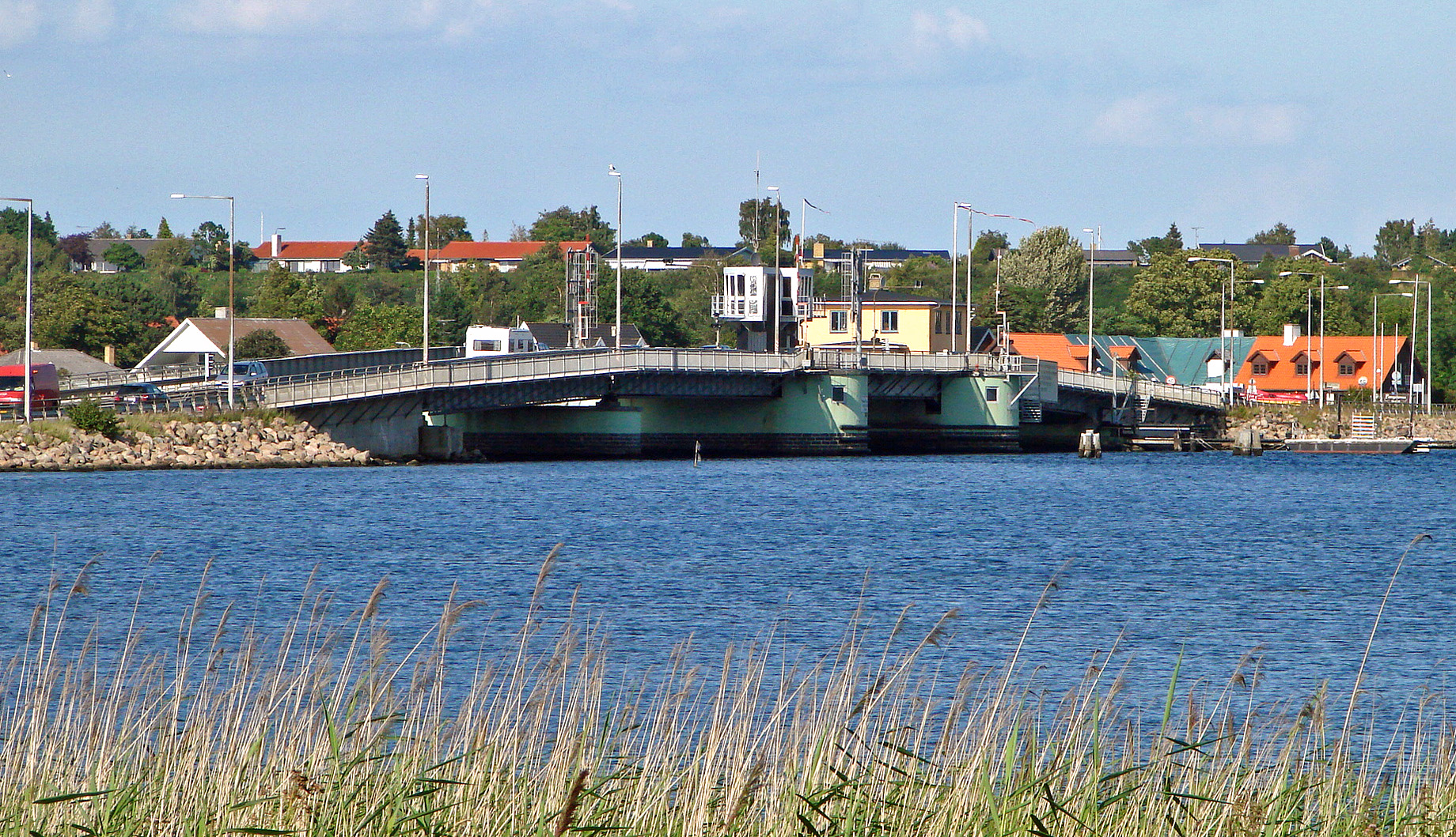 Kronprins Frederiks Bro er en bro over Roskilde Fjord, som forbinder Frederikssund med Hornsherred. Broen set fra Hornsherred mod nordøst